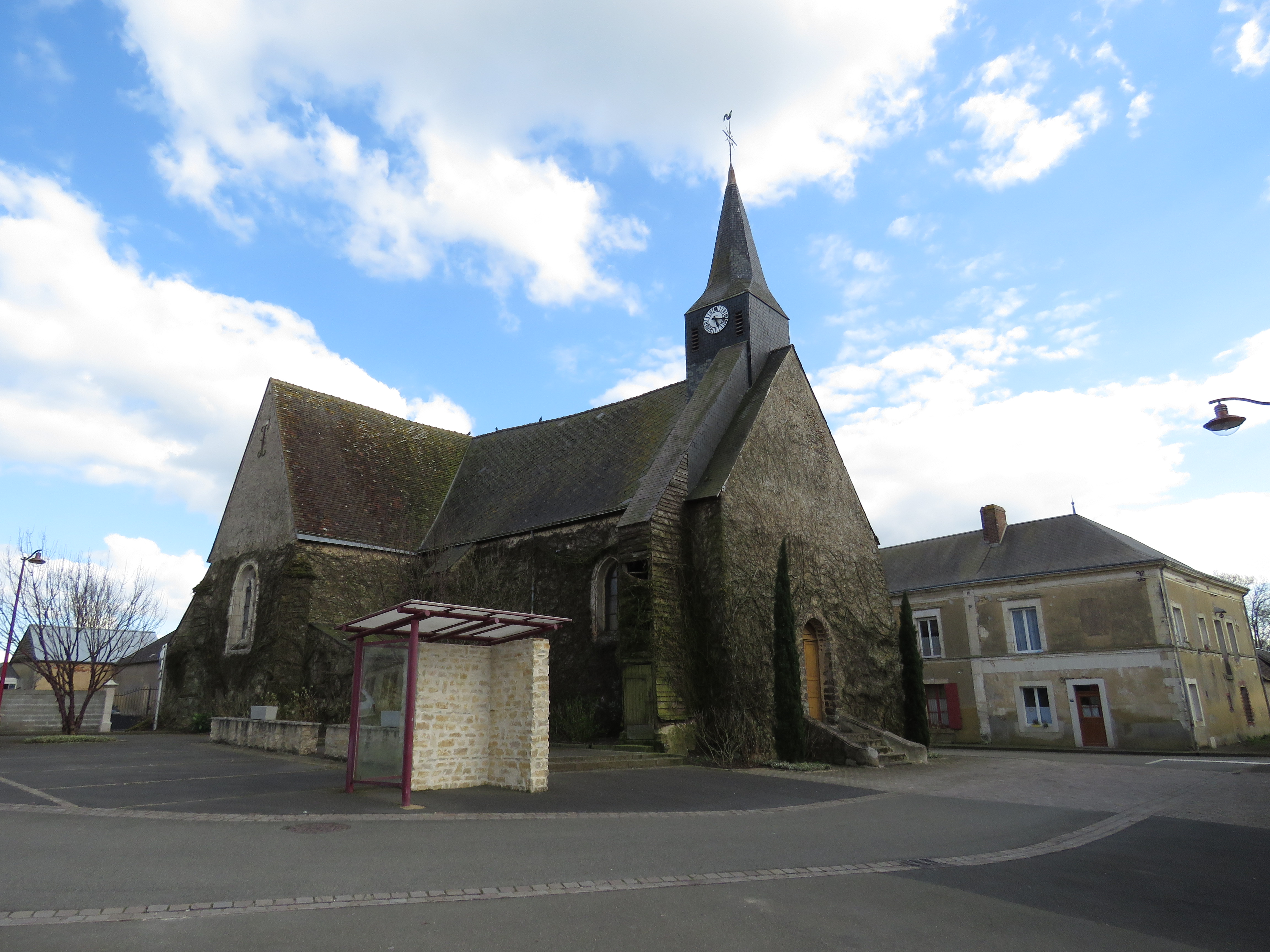 Église d'Écorpain